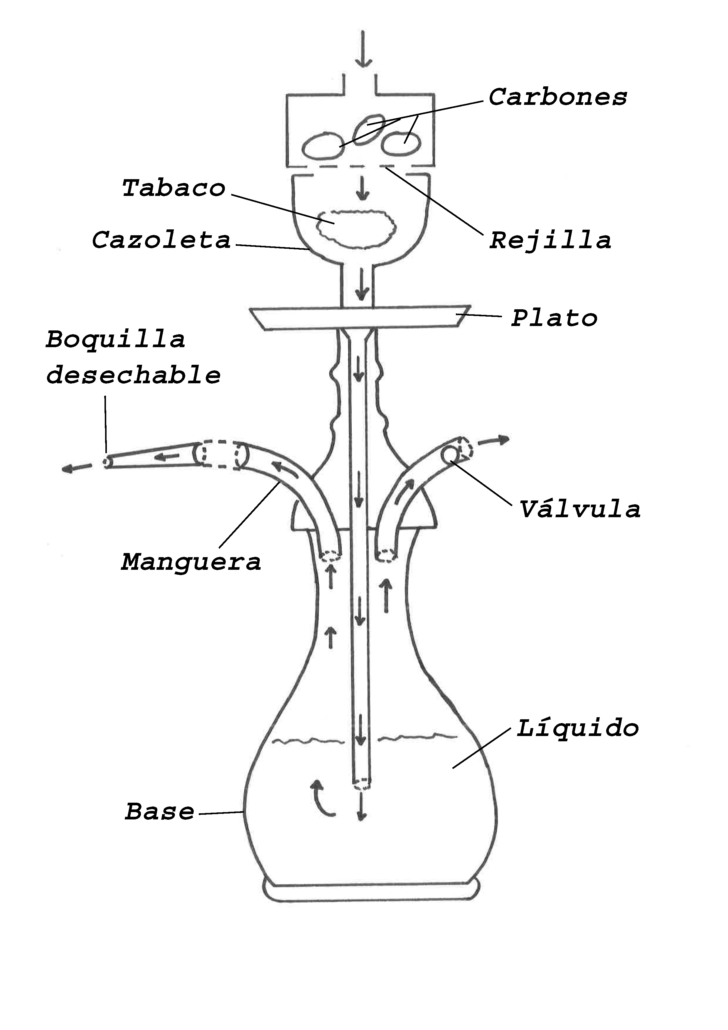 Un narguile (cachimba, shisha, entre otras denominaciones) es un objeto que permite fumar mediante una boquilla adaptada a una manguera por la que se aspira el humo del tabaco que se ha mezclado con otras sustancias en un depósito relleno de líquido.